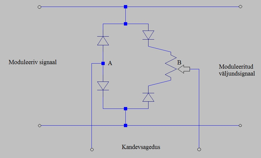 Cowan modulaator amplituudmodulatsiooni sooritamiseks